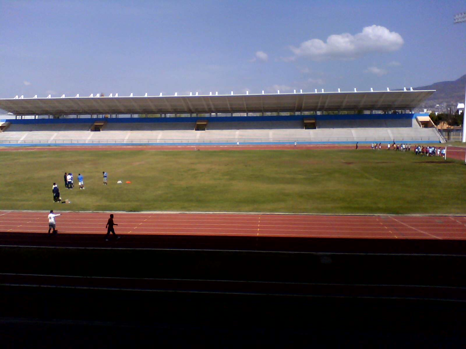 Estadio de Ciudad Universitaria en Morelia